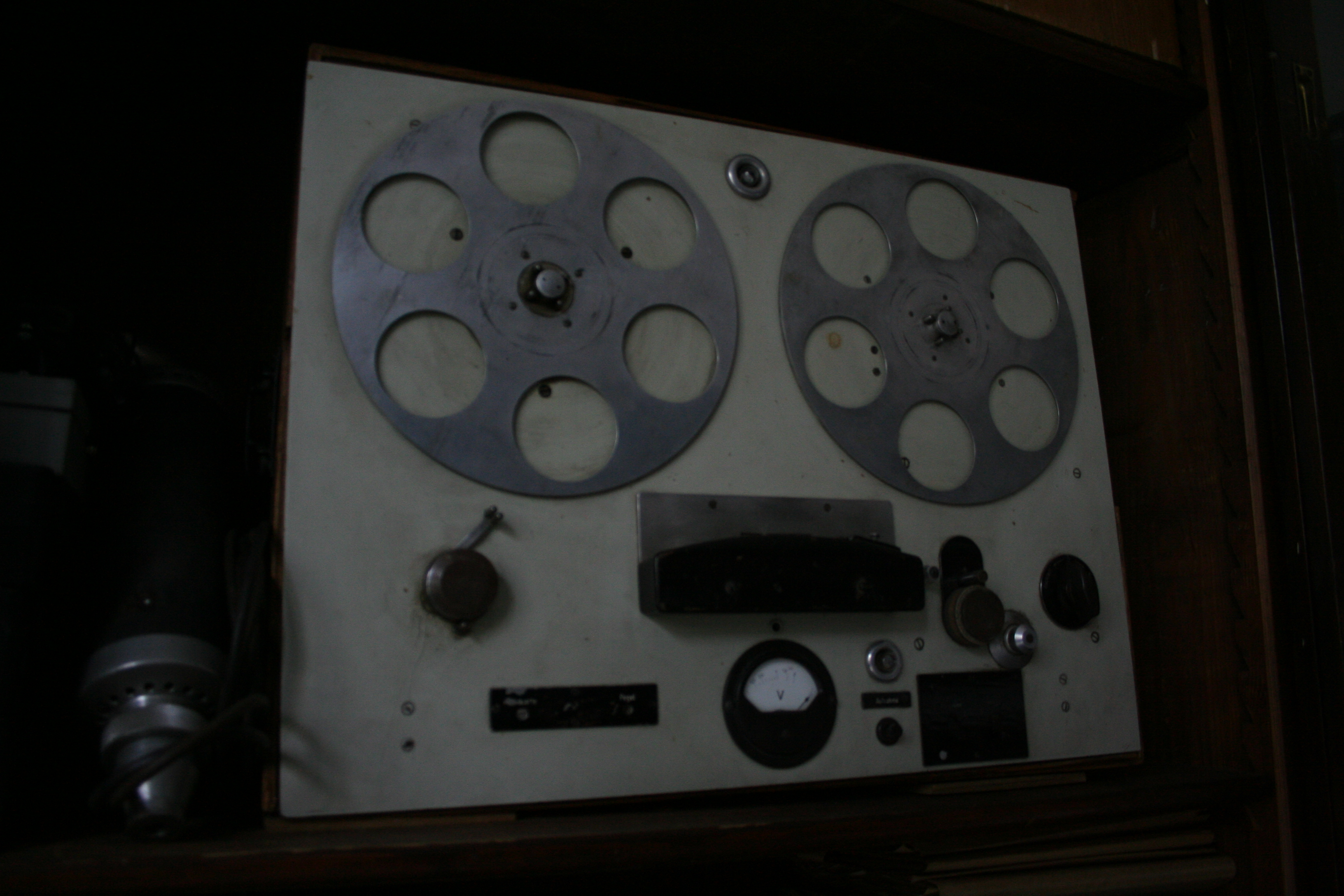 Ein historisches Tonbandgerät von 1951 im Tierstimmenarchiv des Naturkundemuseum Berlin